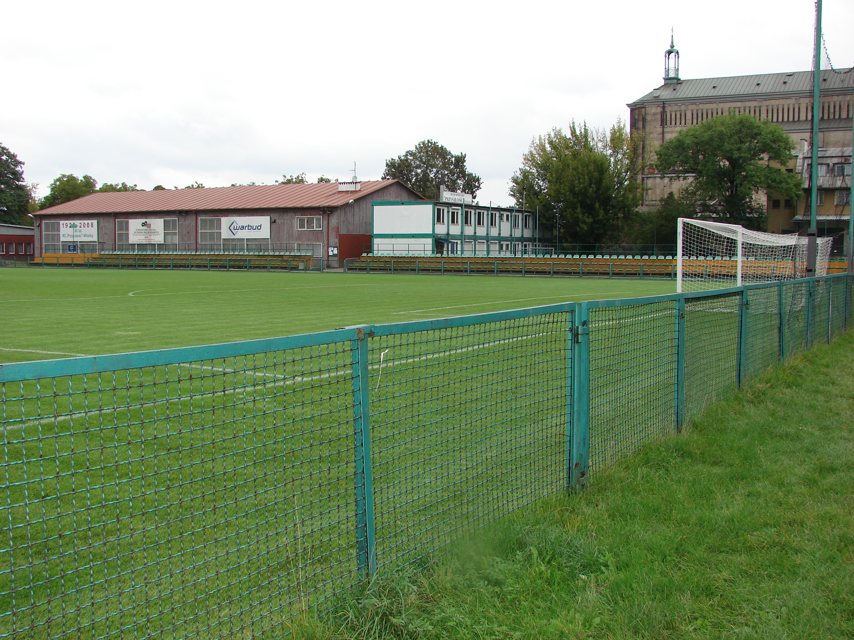 Stadion KS "Przyszłość" Włochy, ul. Rybnicka 25, Warszawa